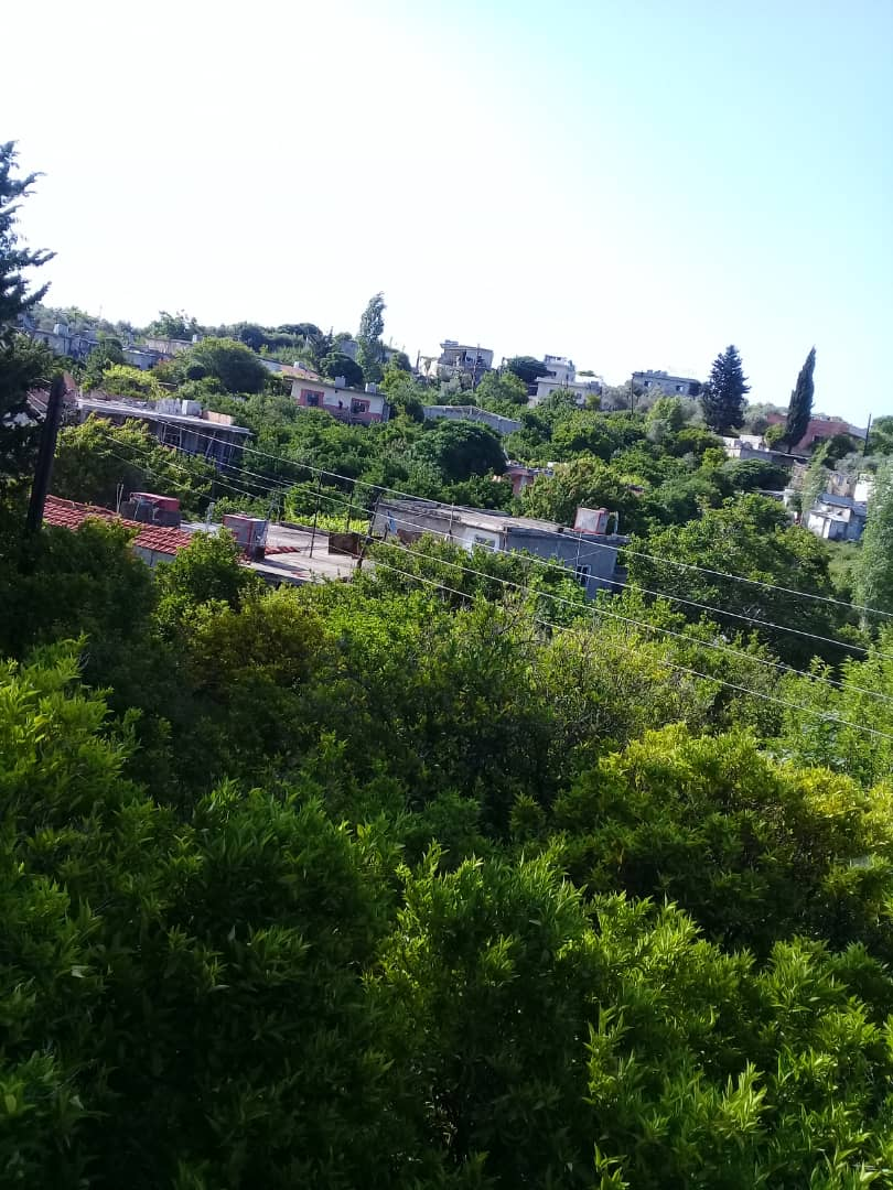 إطلالة من قرية الجديدة - اللاذقية - سوريا